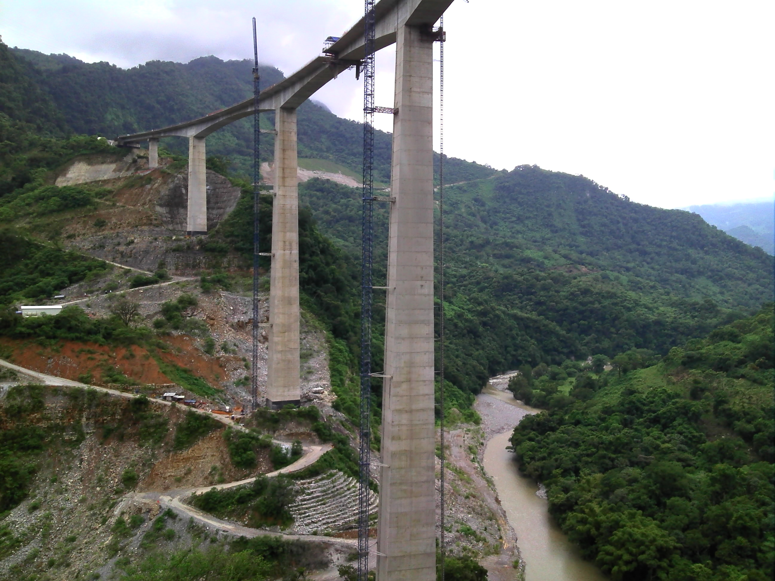 Puente San Marcos